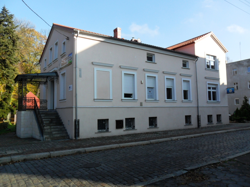 Gubin ul. Słowackiego 1a